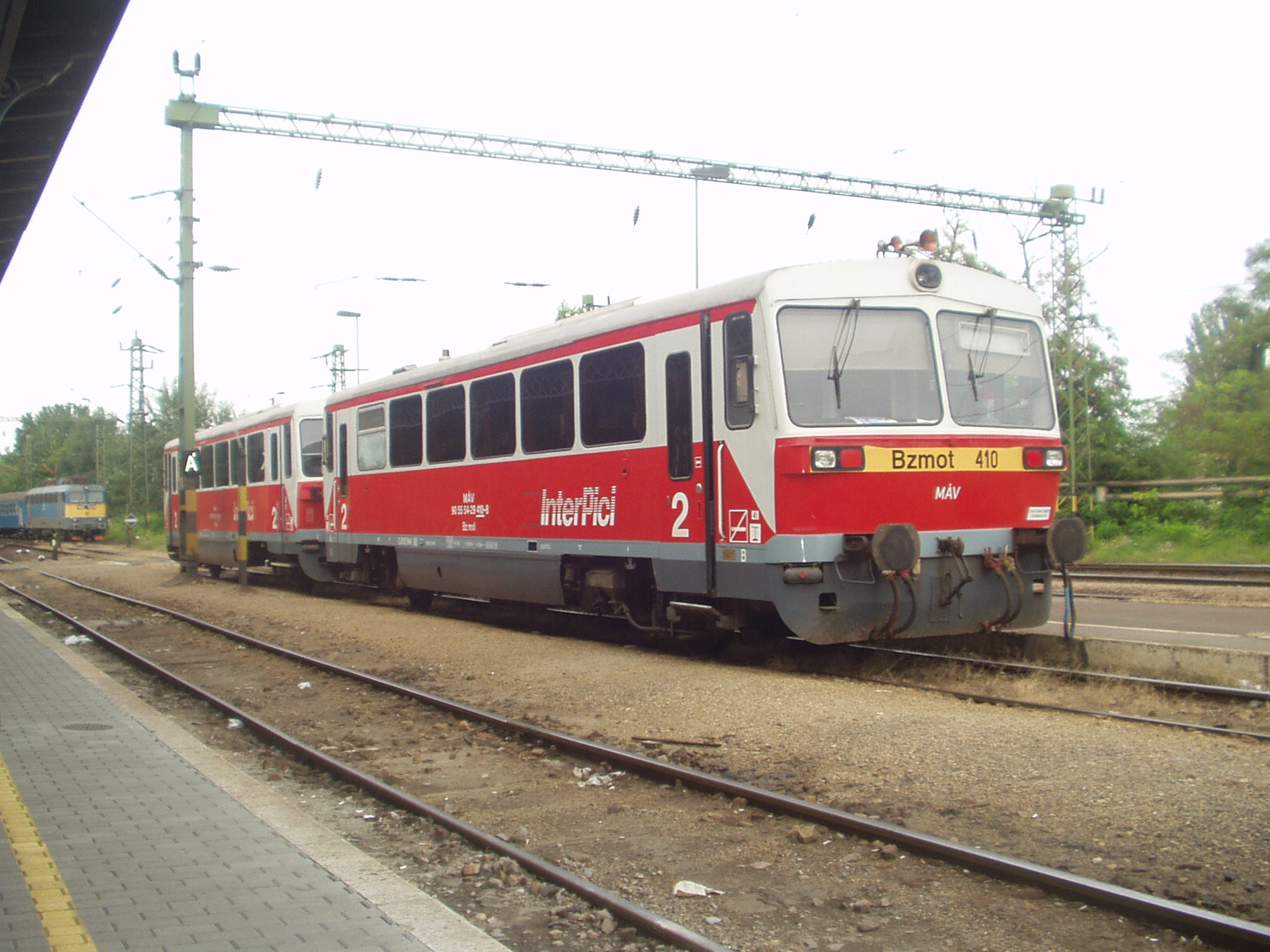 Bzmot 410 a szegedi vasútállomáson